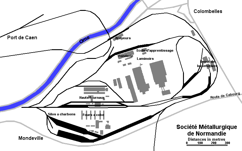 Map of the Société Métallurgique de Normandie steel plant, Caen.